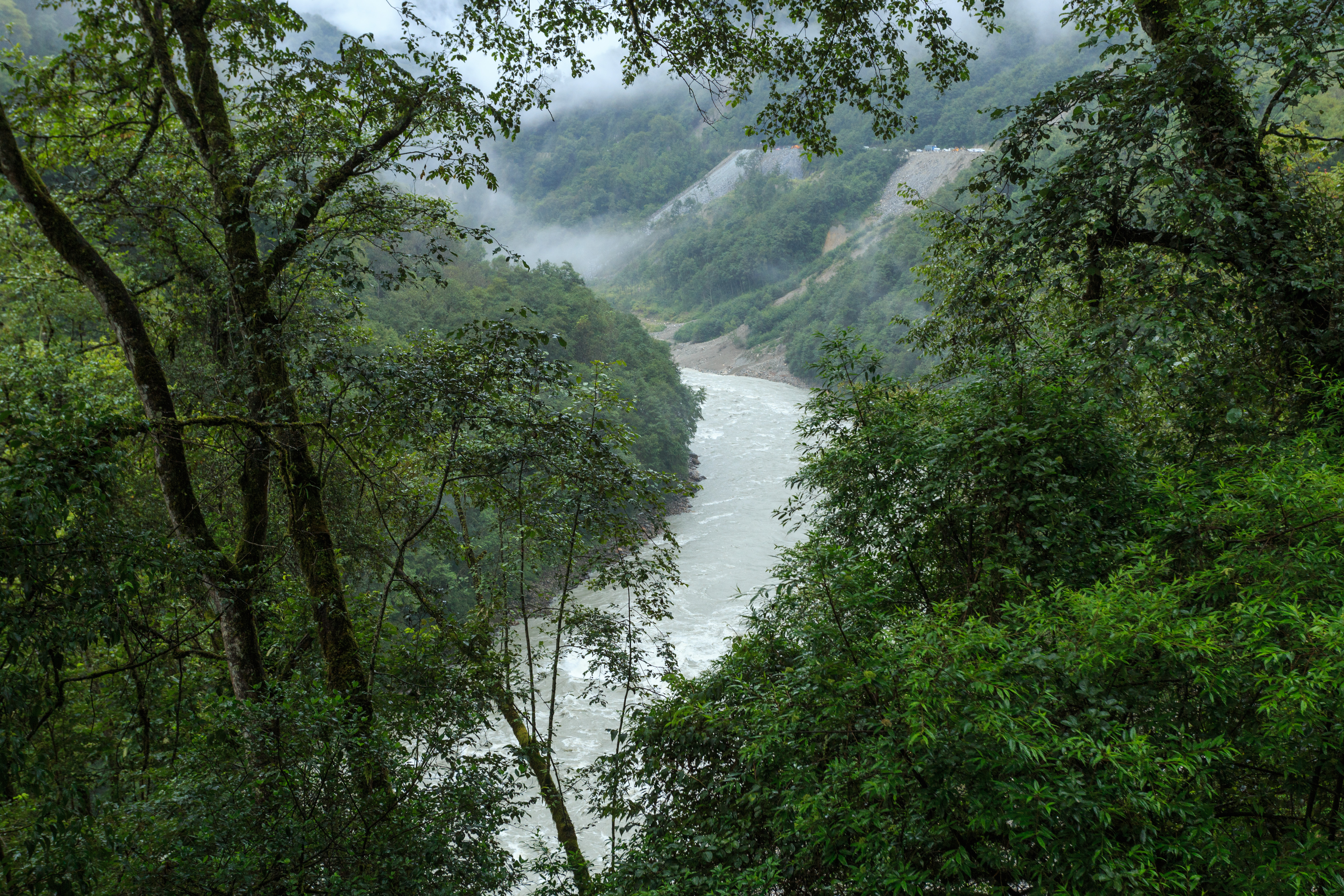 帕隆藏布—— 波密县通麦东部